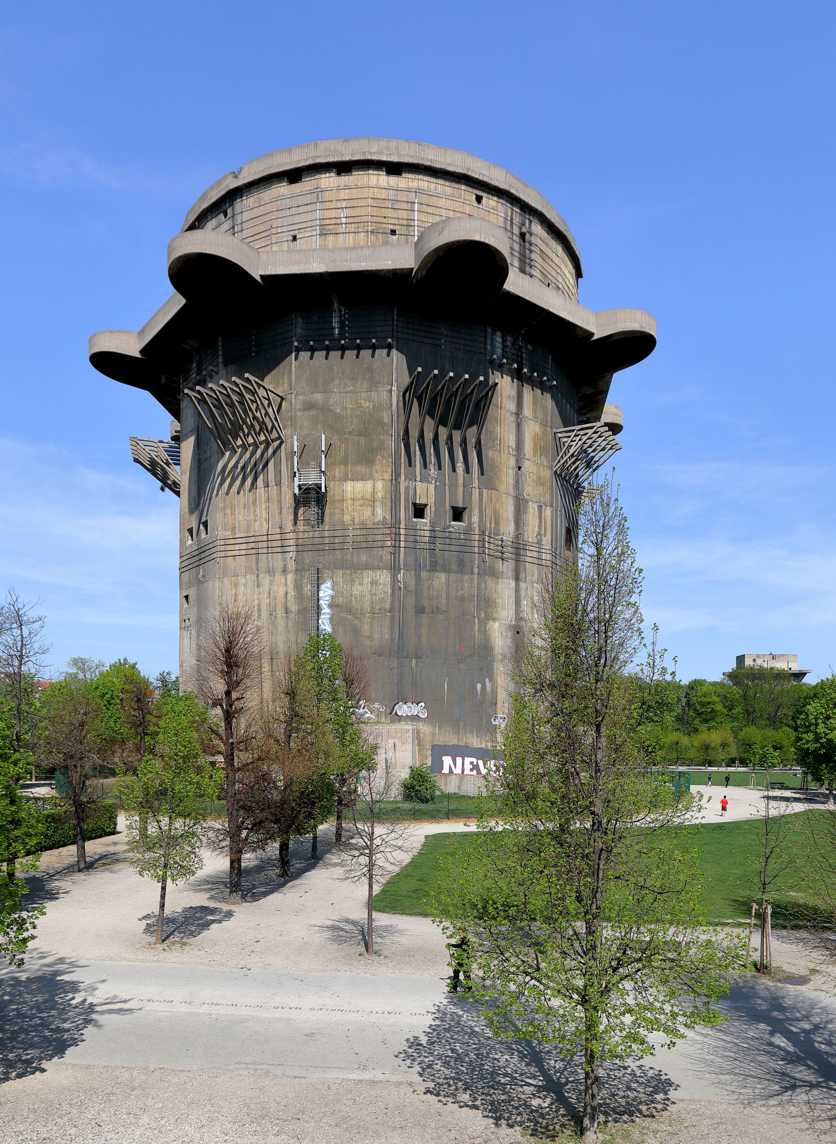 Das Flakturmpaar im Augarten des 2. Wiener Gemeindebezirkes Leopoldstadt. Im Vordergrund der Geschützturm und rechts hinten der dazugehörige, rd. 400 m nordöstlicher positionierte Leitturm. Die Türme wurden von 1942 bis 1944 nach Plänen des Architekten Friedrich Tamms errichtet. Der Geschützturm hat einen Durchmesser von rd. 43 m, eine Wanddicke von rd. 2,5 m und die Deckenstärke beträgt rd. 3,5 m. Weitere Flakturmpaare gibt es in Wien im Arenbergpark und in der Stiftskaserne (Geschützturm) / Esterházypark (Leitturm).